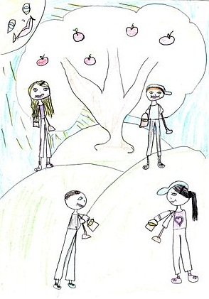 שלב ראשית הריאליזם